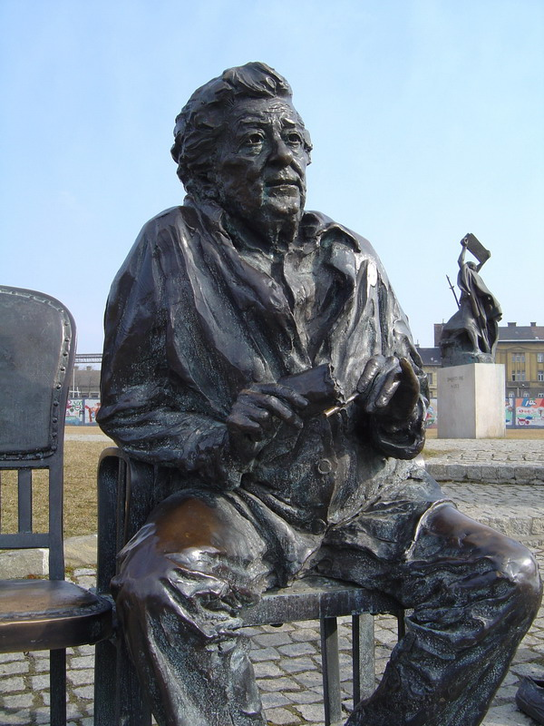 Gobbi Hilda szobra a Nemzeti Színház mellett Budapesten (H-1095 Budapest, Bajor Gizi park 1.), Párkányi Raab Péter szobrászművész alkotása Fotó: Fekist